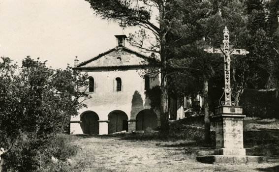 Ermitage-st-feeréol-Lorgues-ancien calvaire